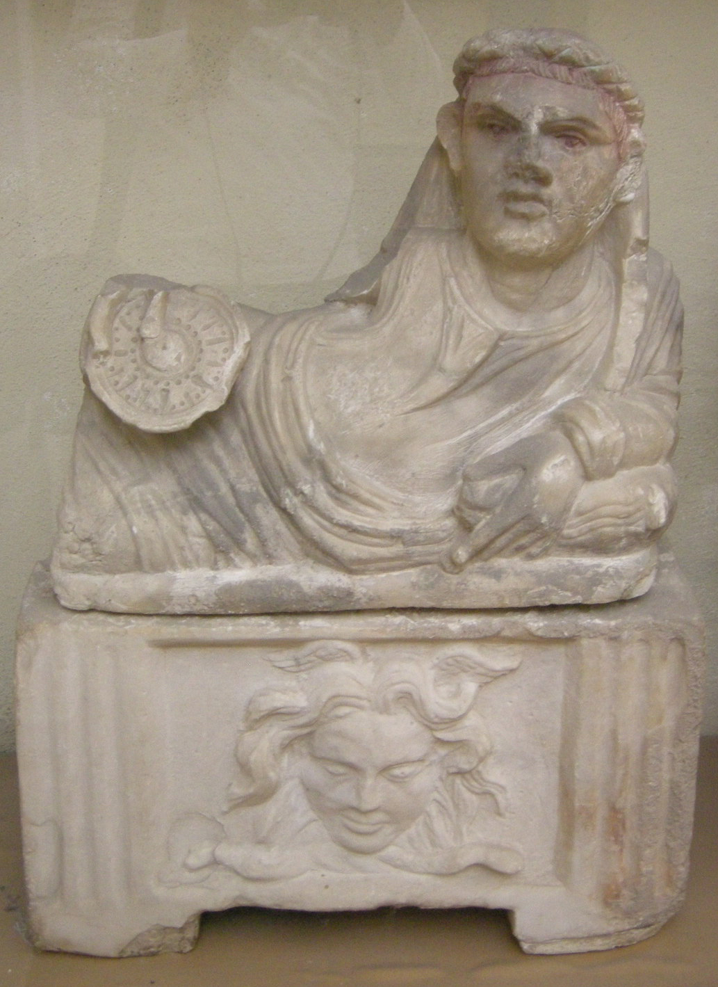 Museo guarnacci, urnetta etrusca